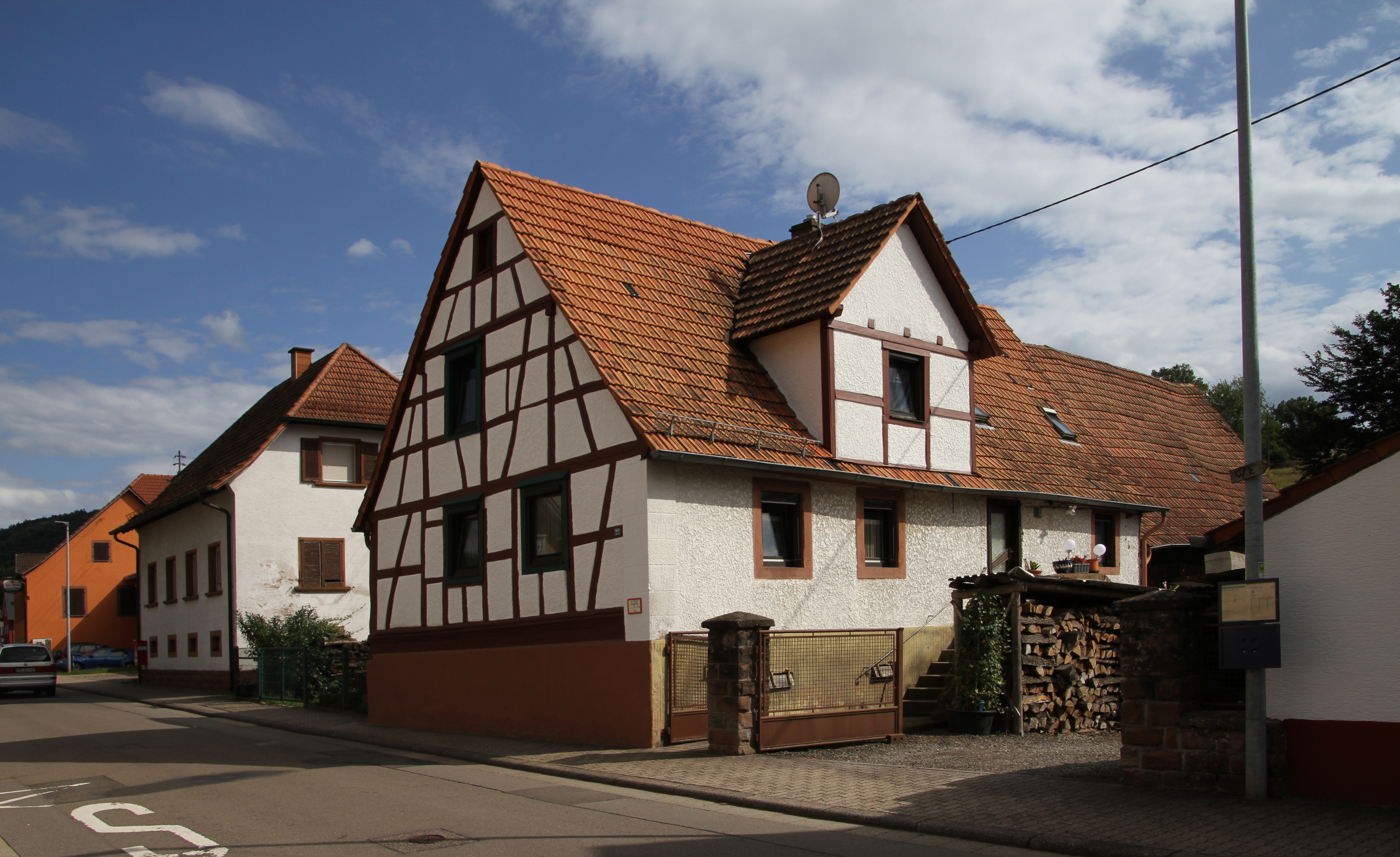 Schindhard, Hauptstraße 22; Fachwerkhaus, verputzt.